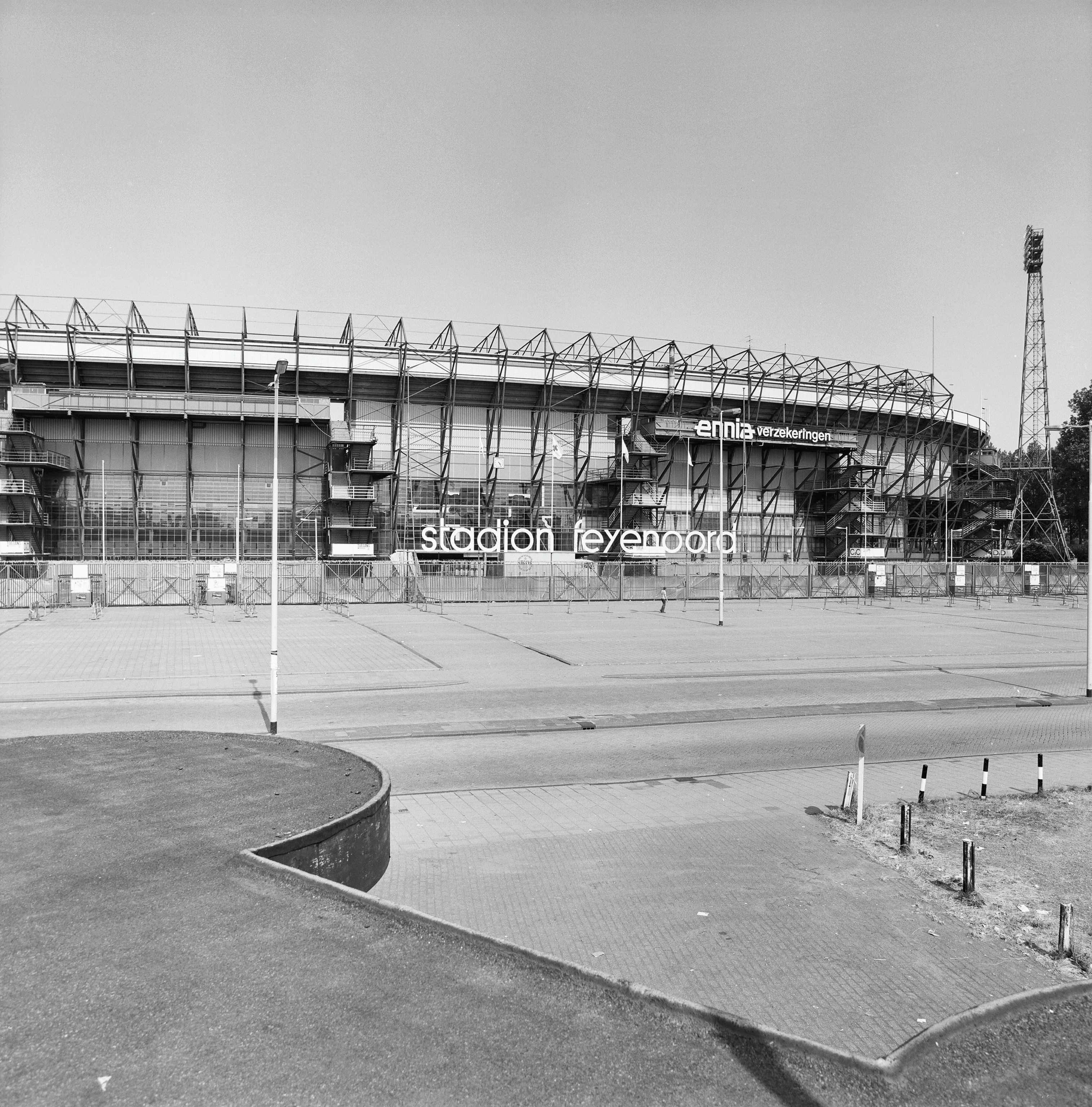 Feyenoord Stadion - voetbalstadion - De Kuip: Overzicht buitenzijde stadion